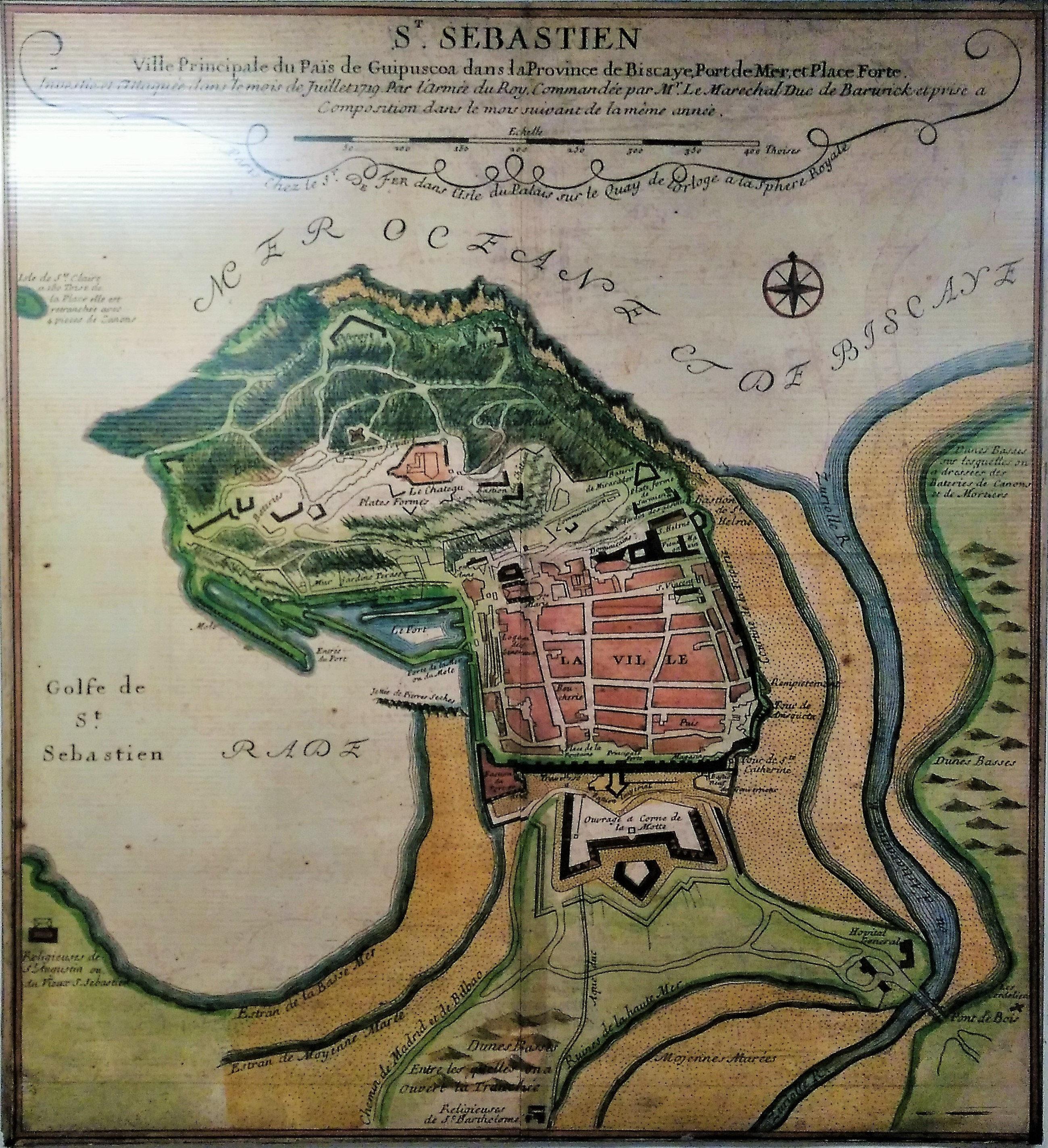 1719ko Donostiako mapa, frantsesez